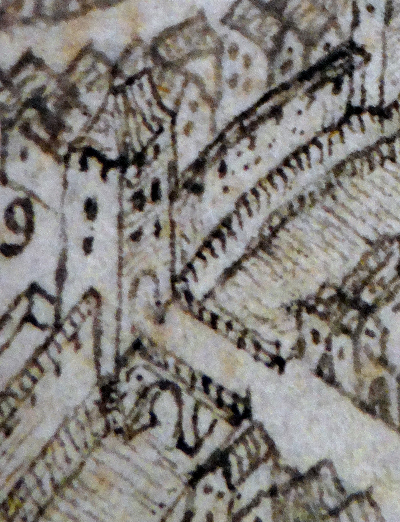 Judenpforte, Worms. Detail aus: Peter Hamman: Statt Wormbß wie selbige 1631 vor dem Schwedischen Ruin der Vorstätt [...] verblieben. Stadtarchiv Worms, Abt. 1B, Nr. 48.